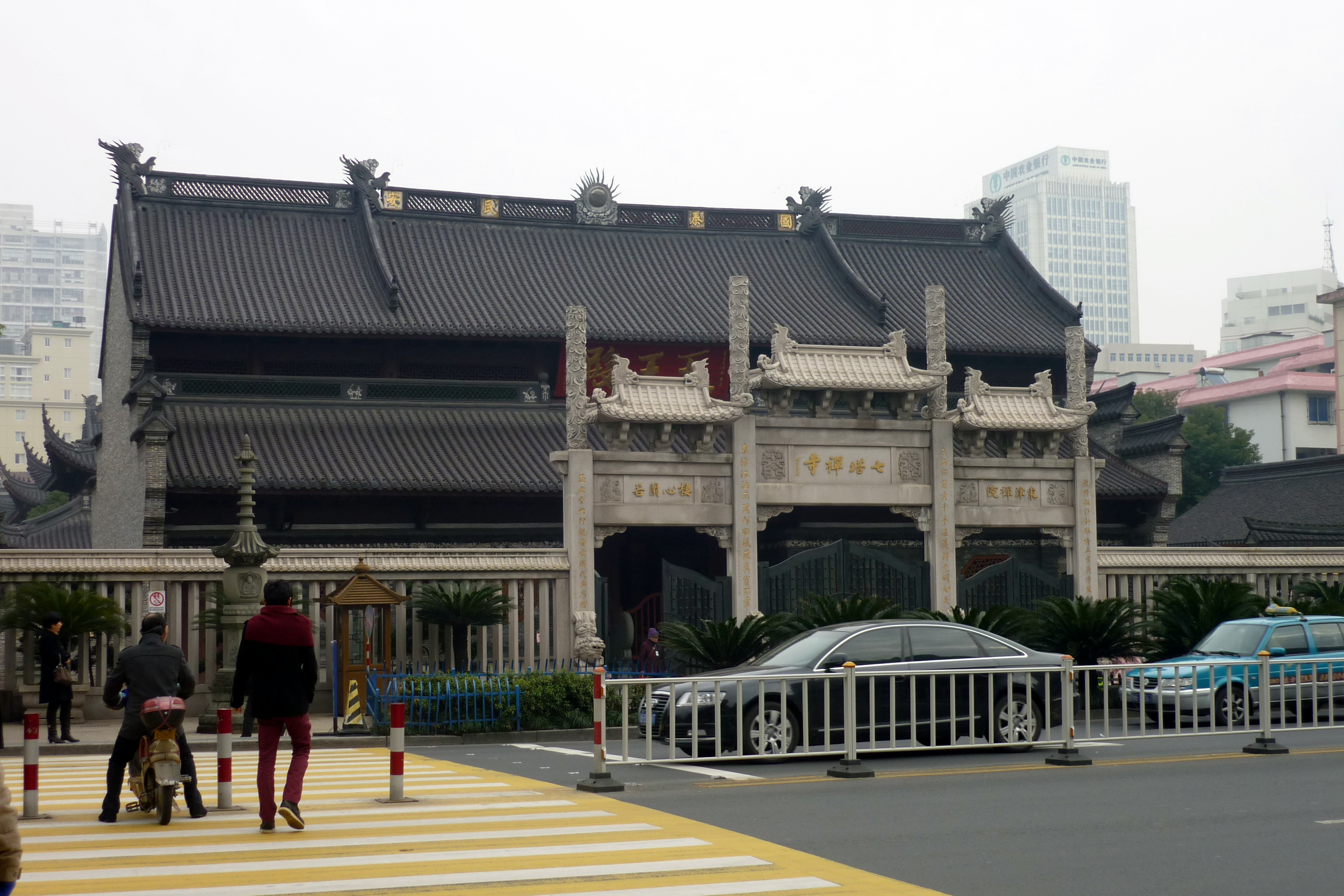 七塔寺大门口